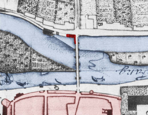 Hospital St. Spiritus auf einer Karte von 1728 von Münden, Karte nachträglich genordet